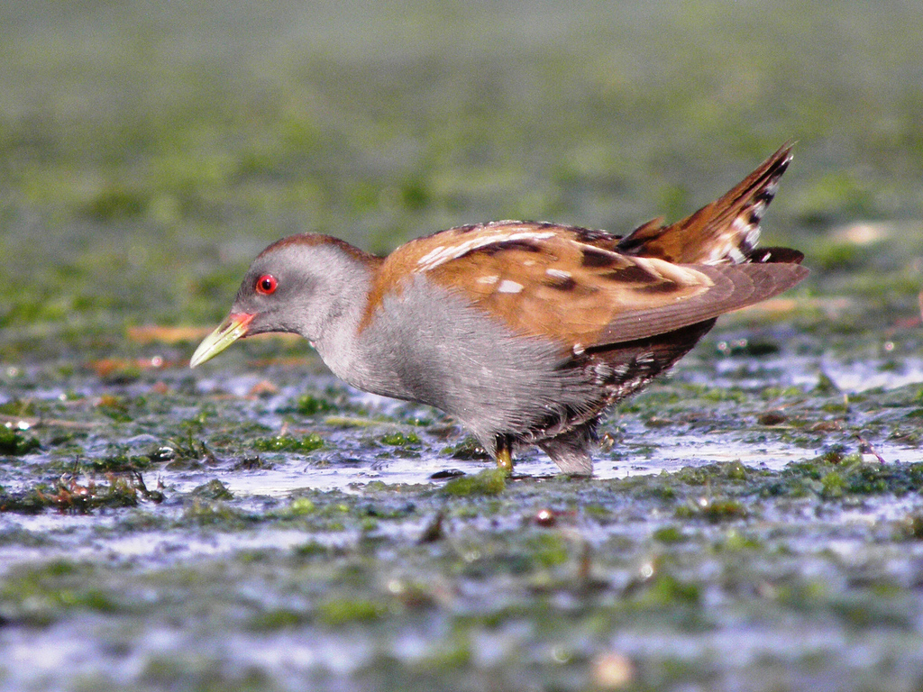 Τ.Λ.ΑΓΥΙΑΣ ΧΑΝΙΑ